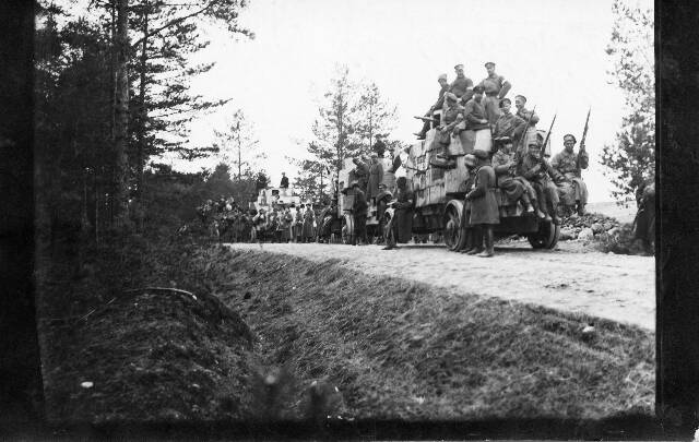 Soomusrong nr. 3 dessant ja soomusautod Mõniste juures 1919. aasta aprillis pärast enamlaste liinist läbimurdmist.